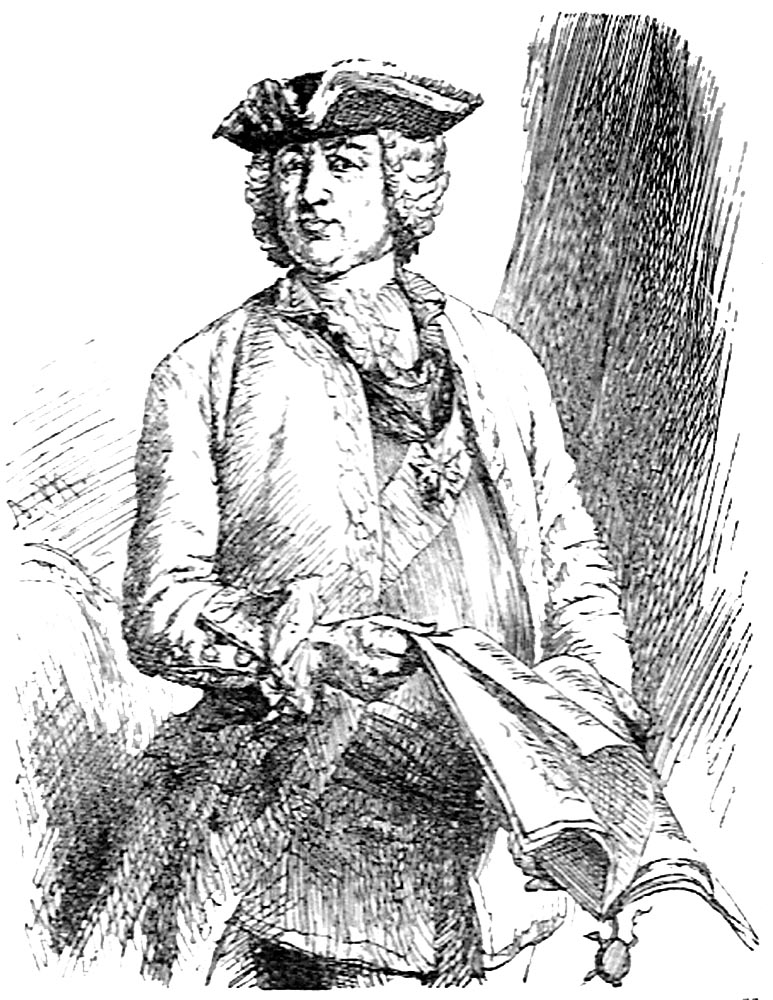 Bildnis H. von Seckendorffs